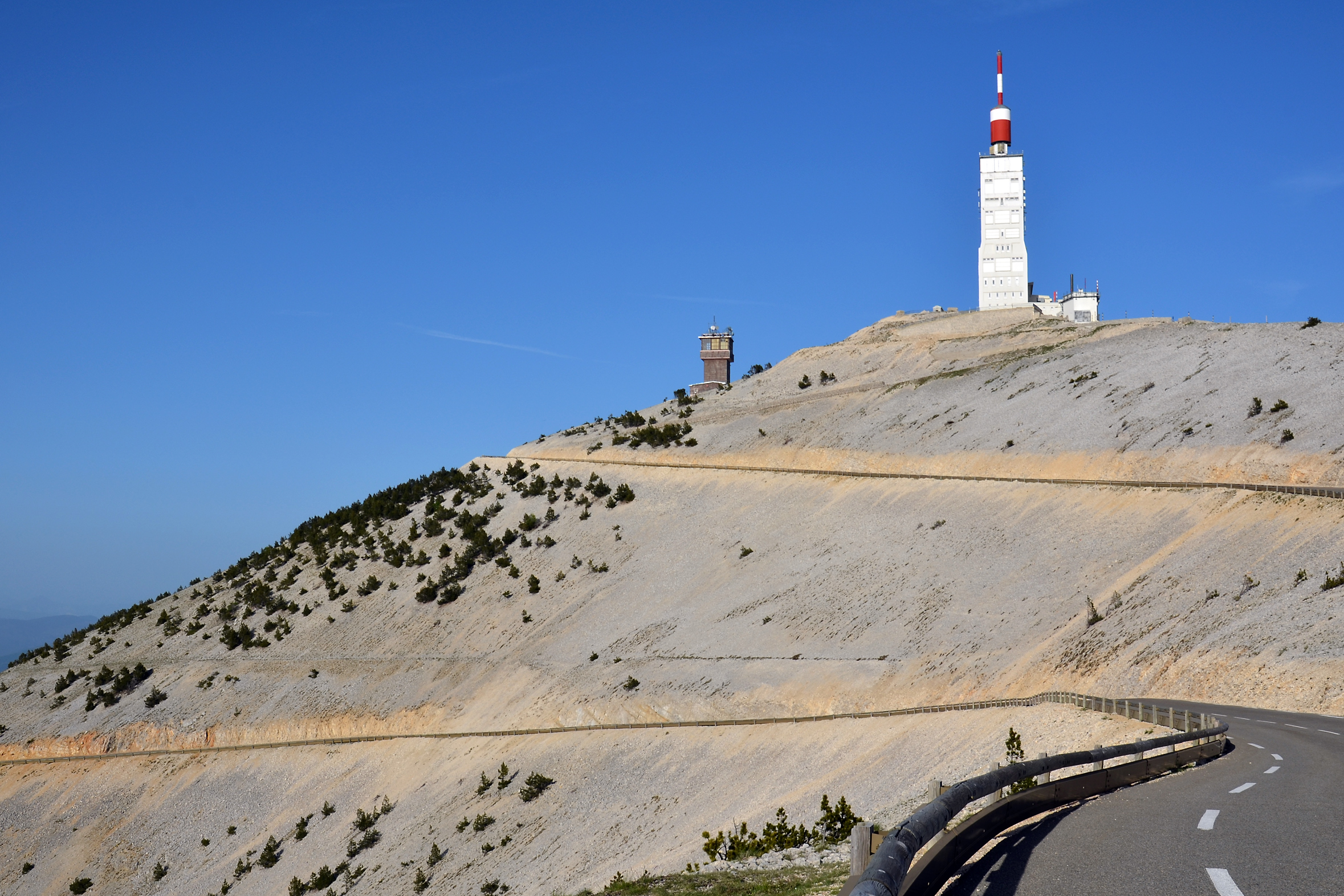 Mont Ventoux Gipfel